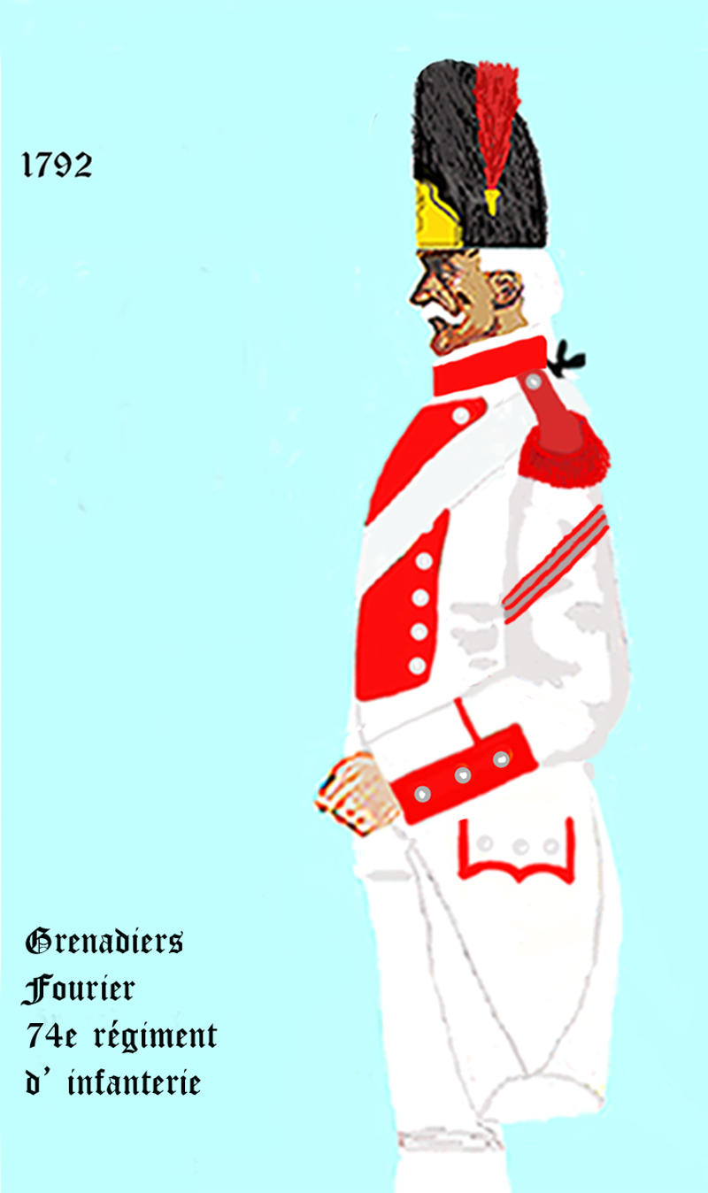 Uniform eines königlich französischen Infanterie-Regiments gemäß Dekret von 1792. - Entnommen und überarbeitet aus: „LES UNIFORMES ET LES DRAPEAUX DE L'ARMÉE DU ROI“ Marseille 1899.